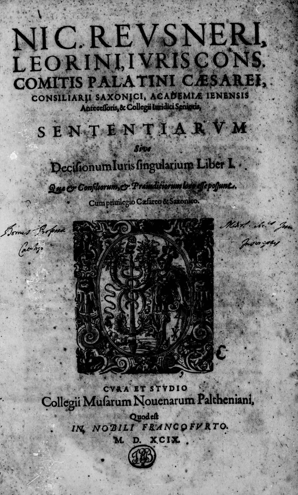 Frontespizio